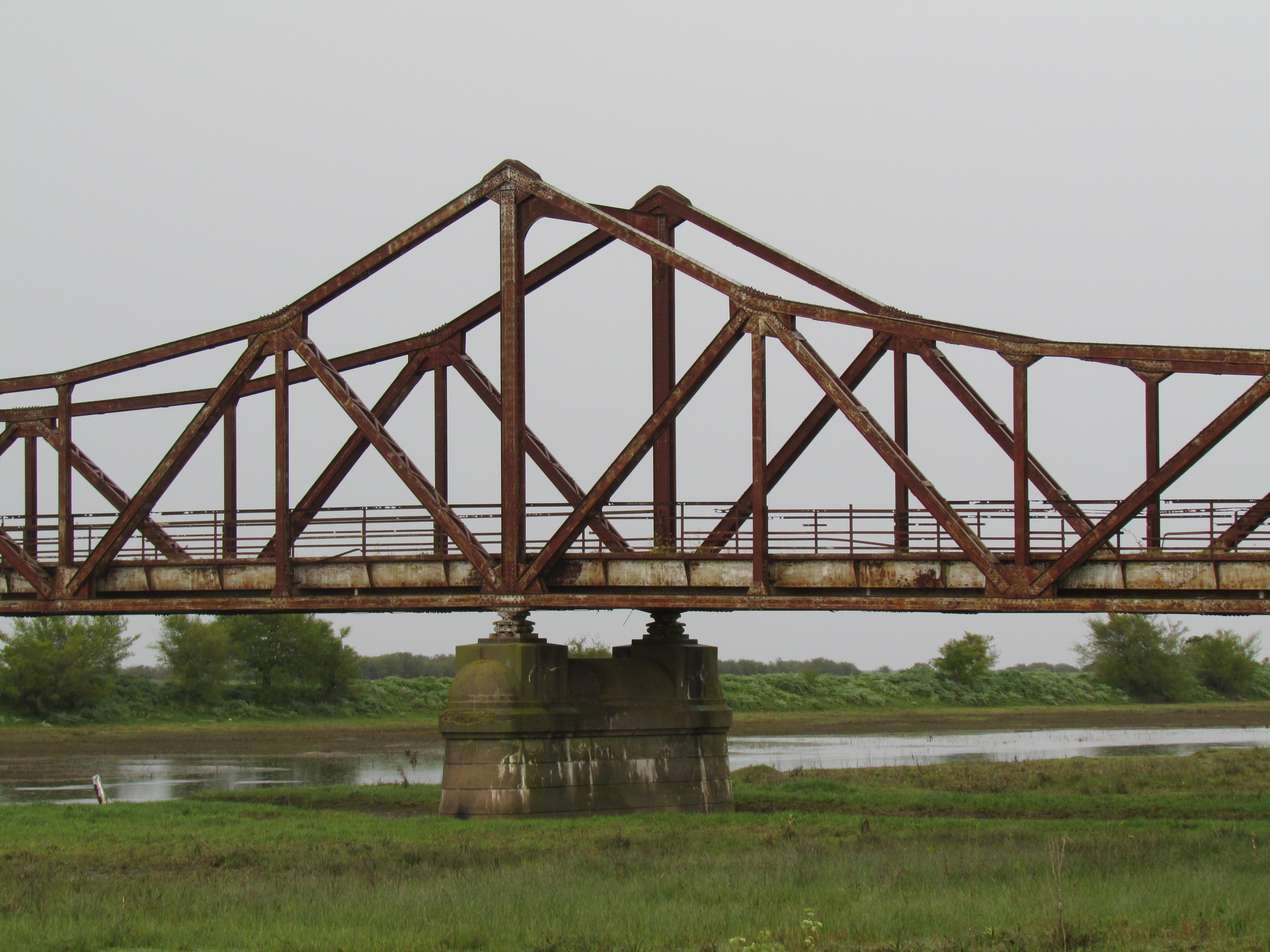 Viejo puente de la ruta provincial 56 sobre el Canal 2 en la zona rural del partido de General Lavalle, provincia de Buenos Aires, Argentina.